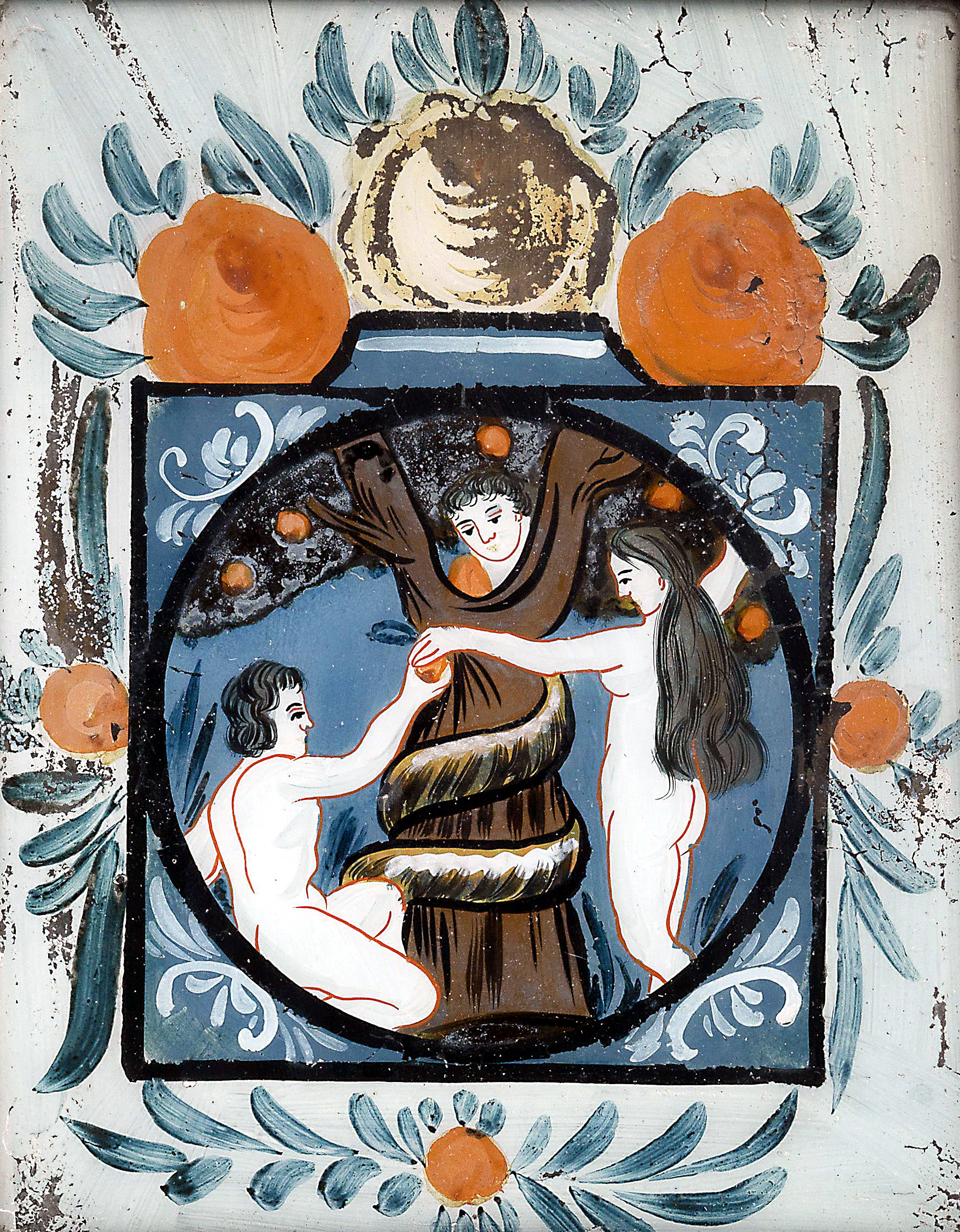 Eva überreicht Adam den Apfel, Schlange umwindet den Baum, Kopf als Mann dargestellt, umgeben von Blumen, Hinterglasbild aus Außergefild (Kvilda), 27 x 32 cm, 19. Jh.